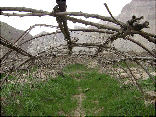 Tunnel Pergola Afghanistan